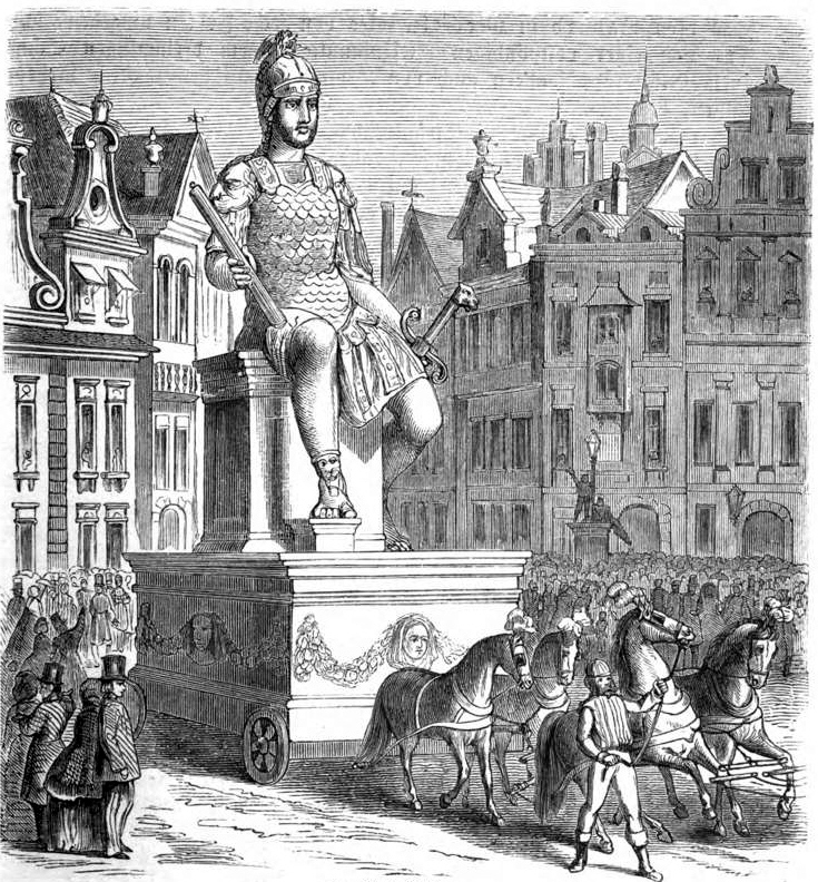 Der Riese Antigoon